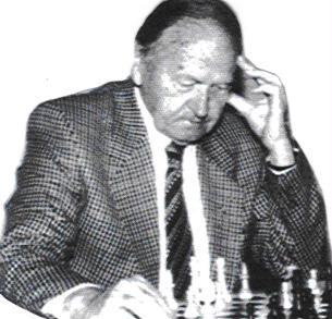 eigen archief